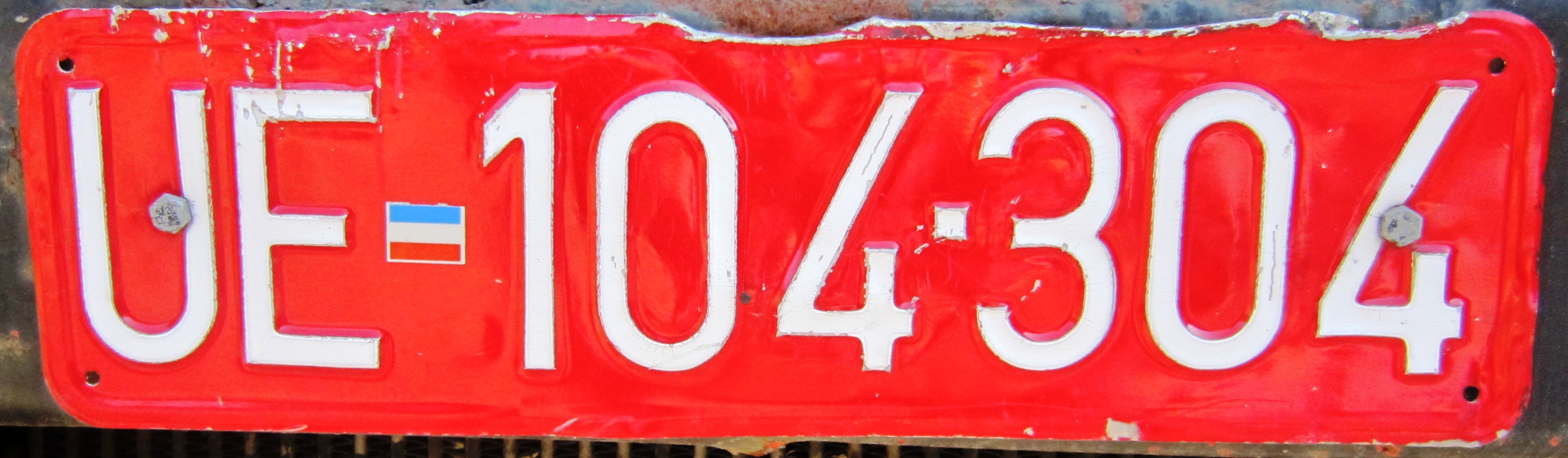 Servië en Montenegro kentekenplaat rood Užice